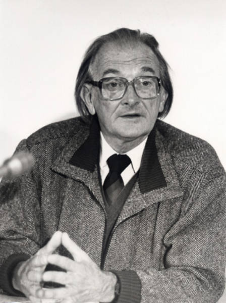 José Lutzenberger recebendo o Right Livelihood Award (Prêmio Nobel Alternativo)